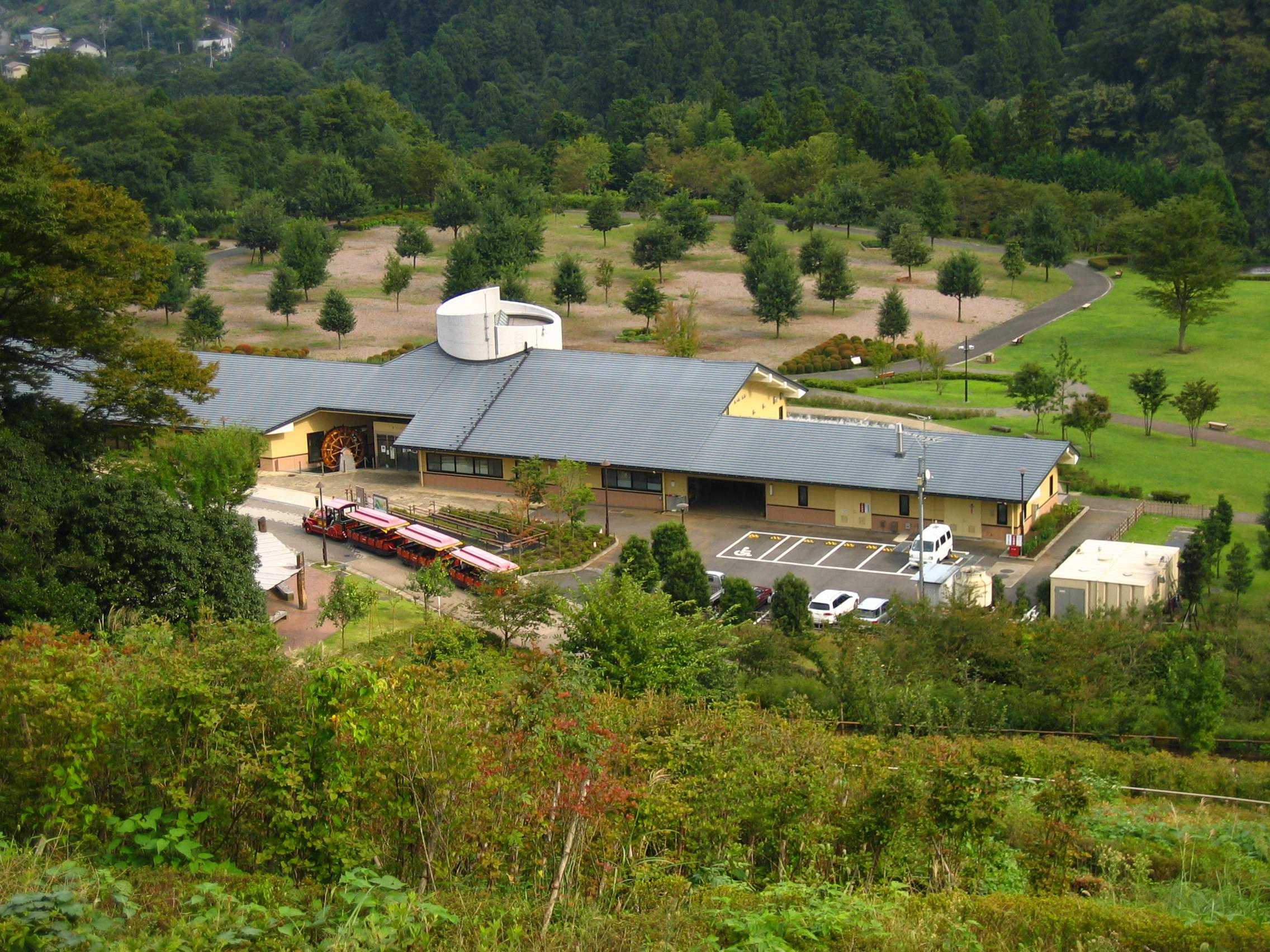 Aikawa park (あいかわ公園) center.